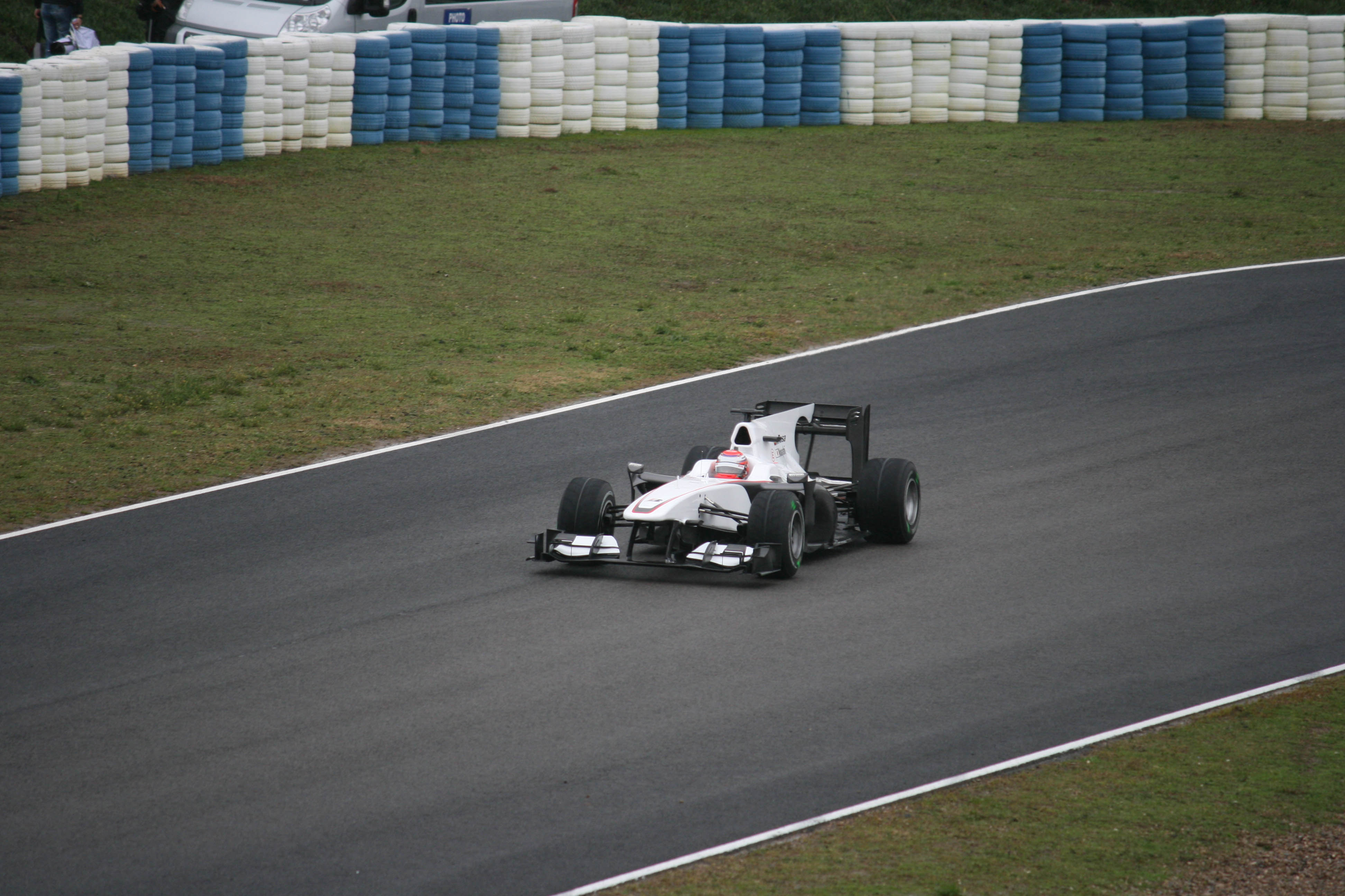 Kamui Kobayashi testing for Sauber at Jerez, 10/02/2010.